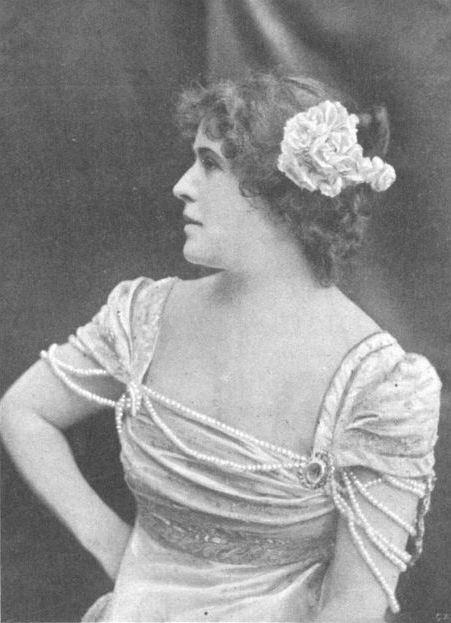 Helene Odilon, 1865-1939, deutsch-österreichische Schauspielerin Helene Odilon, 1865-1939, German / Austrian actress